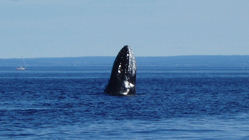 Buckelwal im Sankt-Lorenz-Strom bei Tadoussac.